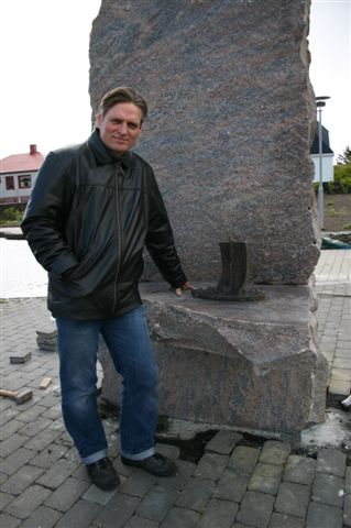 Sculptor Hans Pauli Olsen